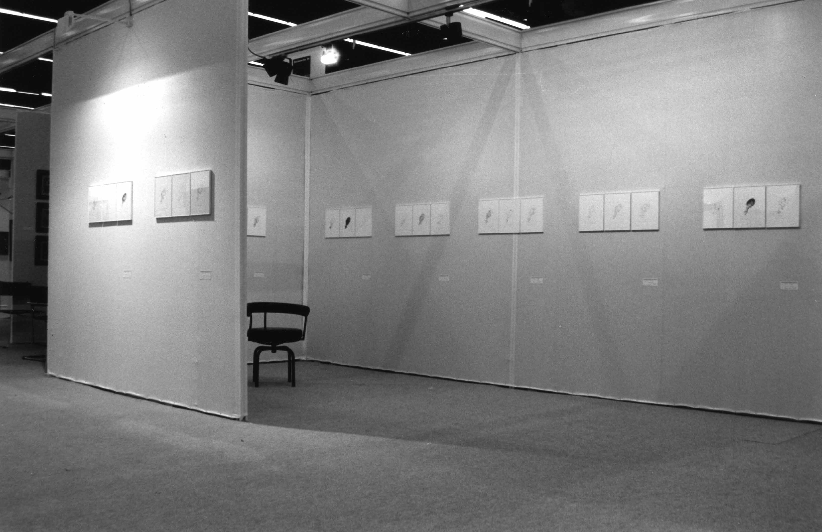 Emmanuel Fournier, Exposition "La même chose", Salon Découvertes, Paris 1994